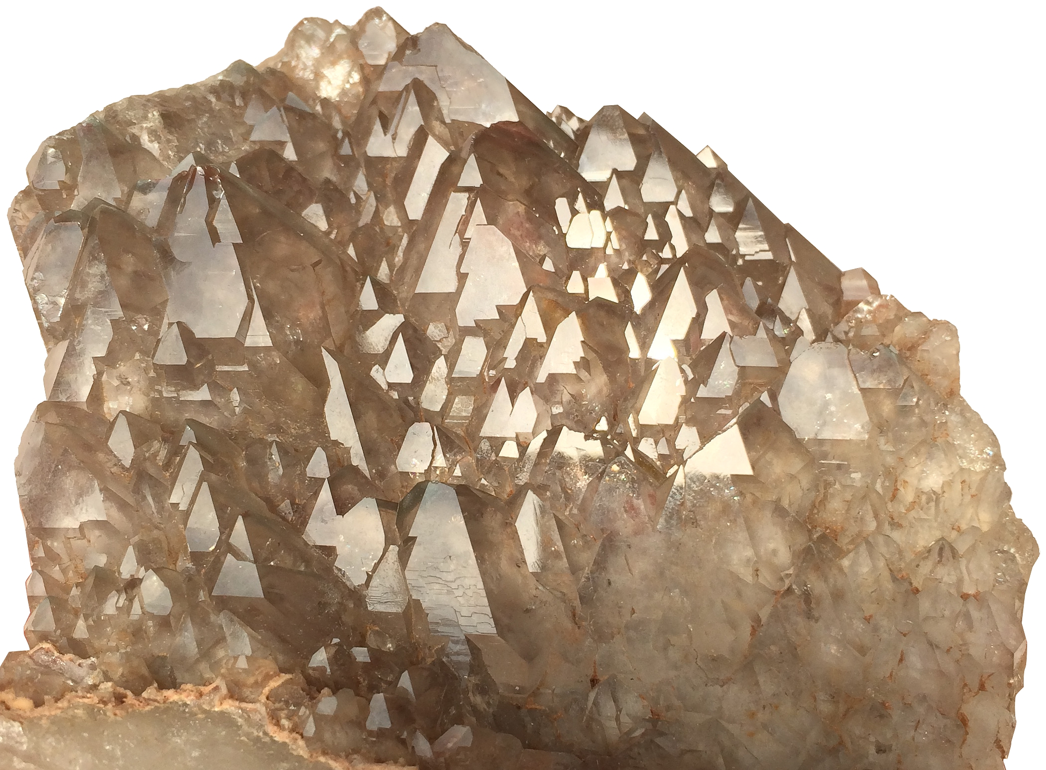 Друза горного хрусталя. Полярный Урал